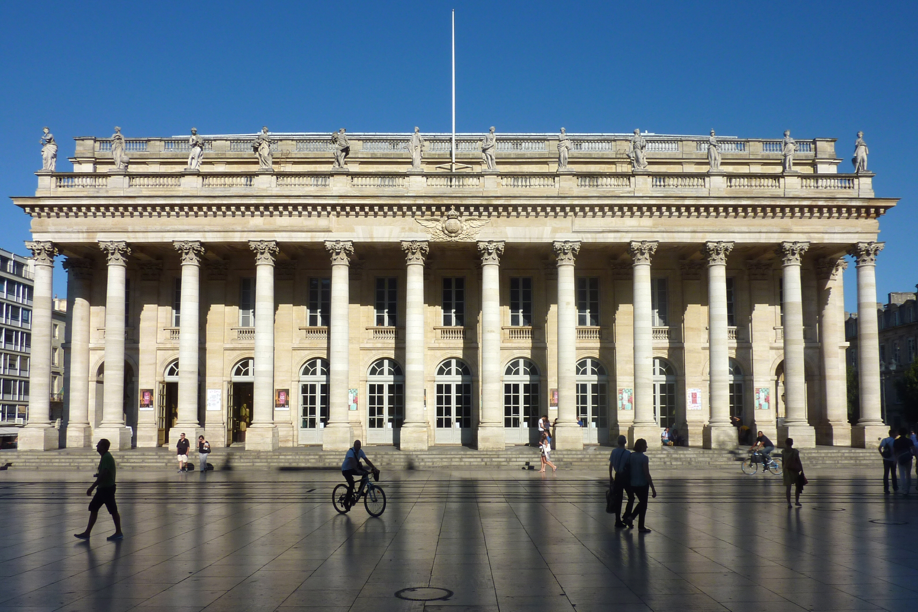 Grand Théâtre siège de l'Opéra national Bordeaux Gironde France